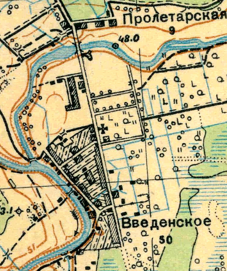 Топографическая карта Ленинградской области, квадрат О-36-13-Г-г (Введенское), деревня Введенское